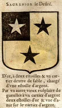 Sagrenior